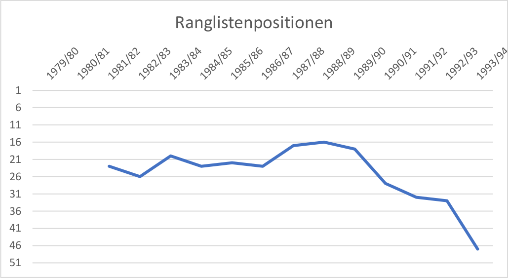 Verlauf der Ranglistenpositionen des walisischen Snookerspielers Cliff Wilson; Diagramm erstellt mittels und Excel.